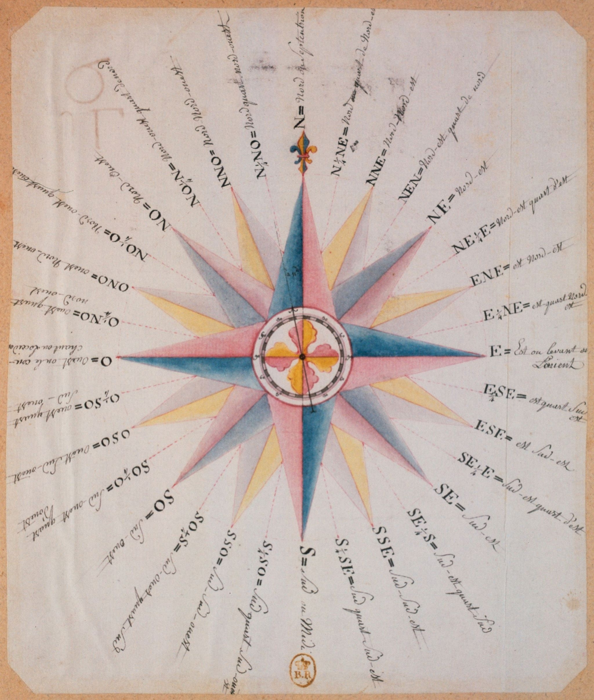 [Boussole] : [dessin] / [Jean-Jacques Lequeu]